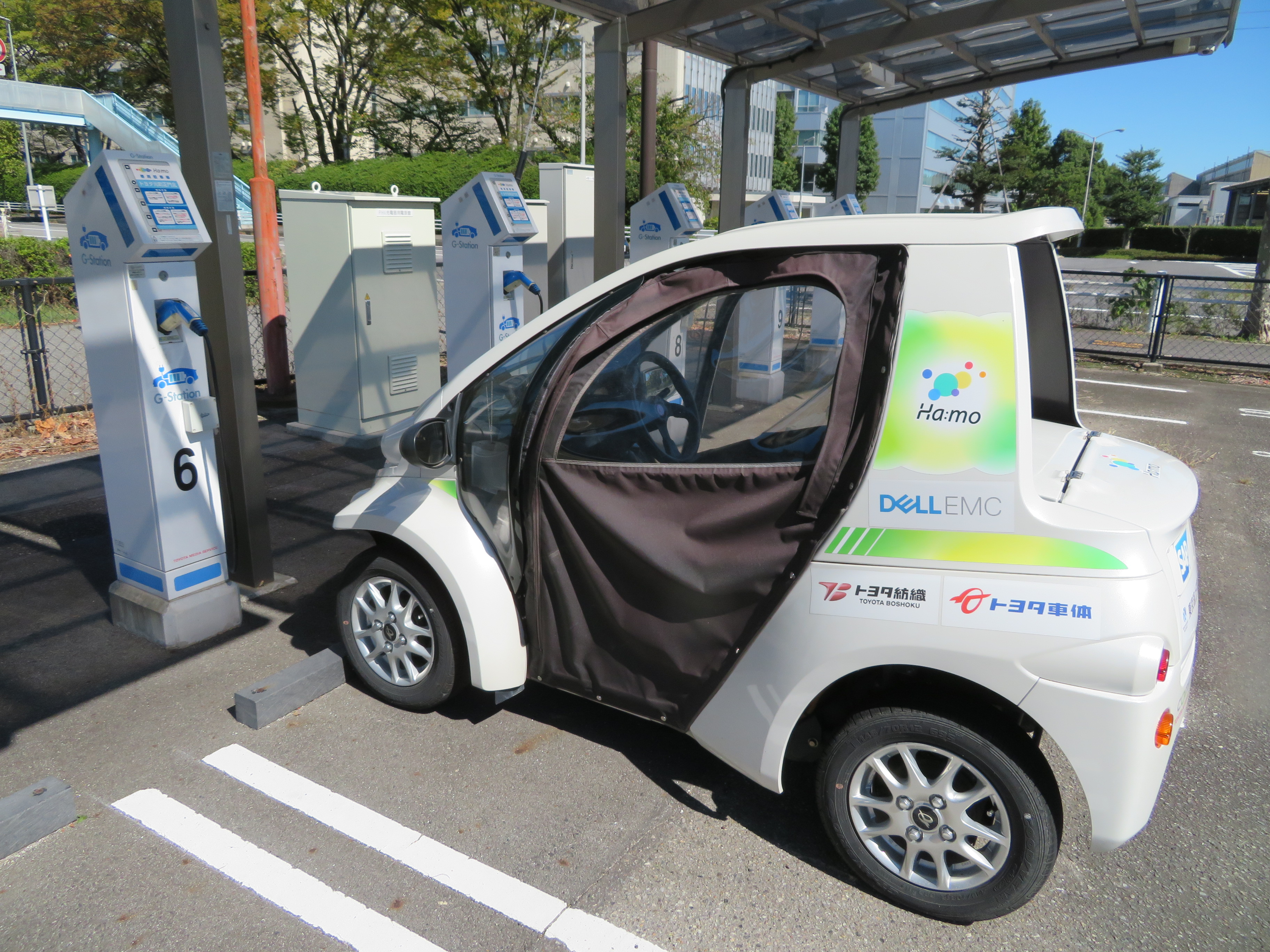 トヨタ自動車元町工場の付近。トヨタ車体が生産する「コムス」。